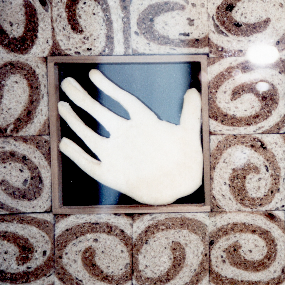 Dans un espace désaffecté de la Plaza 3 située au centre ville d'Alma (Québec, Canada), 5 jeunes artistes du Lac-Saint-Jean exposent leurs oeuvres (Geneviève Boucher, Bianka Robitaille, Jean-Denis Simard, Daniel Fortin, Pascal Bouchard). C'est la même exposition qu'ils ont tenu au Centre d'artistes Le Lieu à Québec. Cette galerie TEMPORAIRE pour artistes sans LIEUX DE TRAVAIL a été fermée à la fin de cette exposition en 2002.